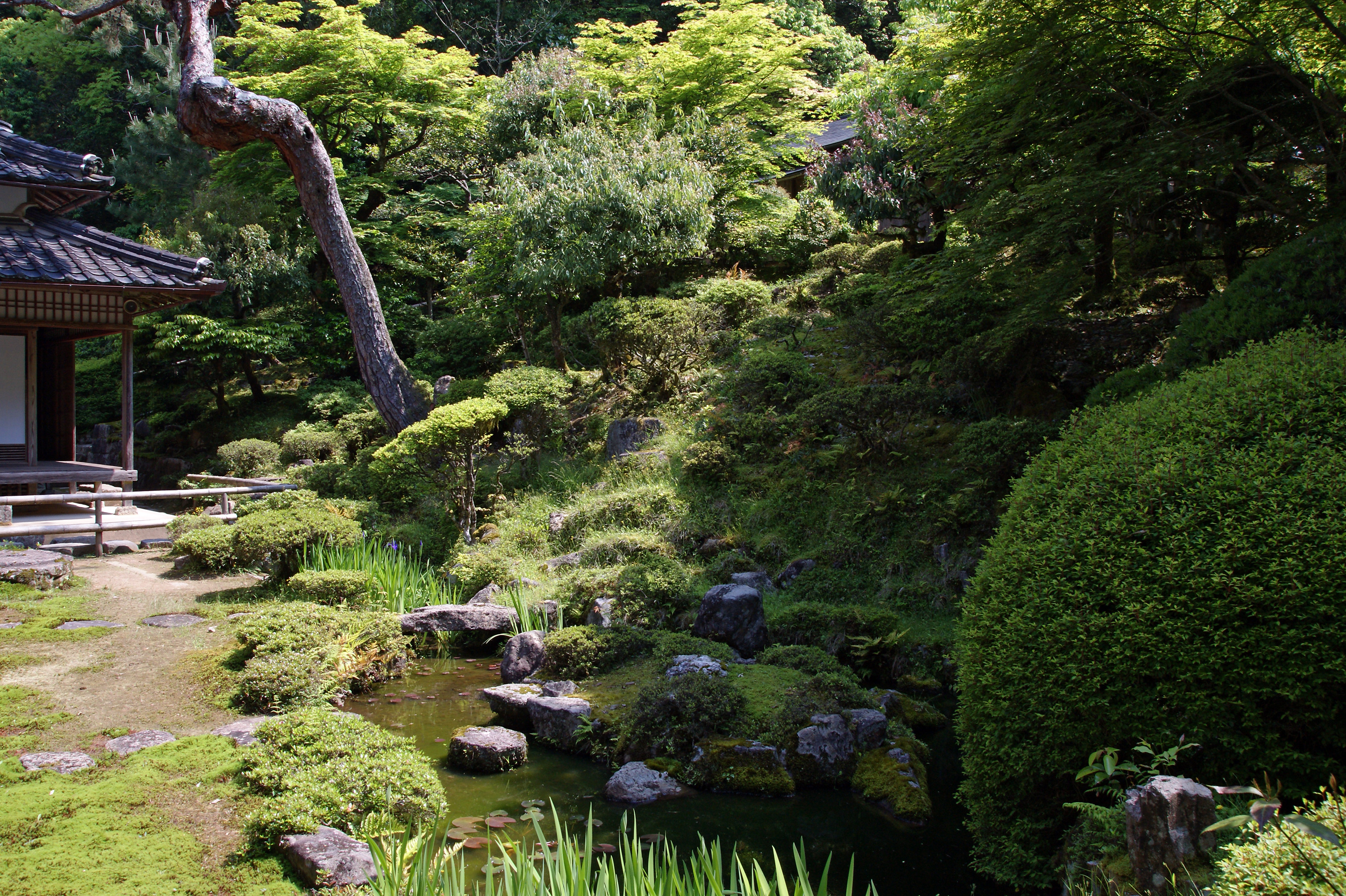 Sukyoji in Izushi, Toyooka, Hyogo prefecture, Japan